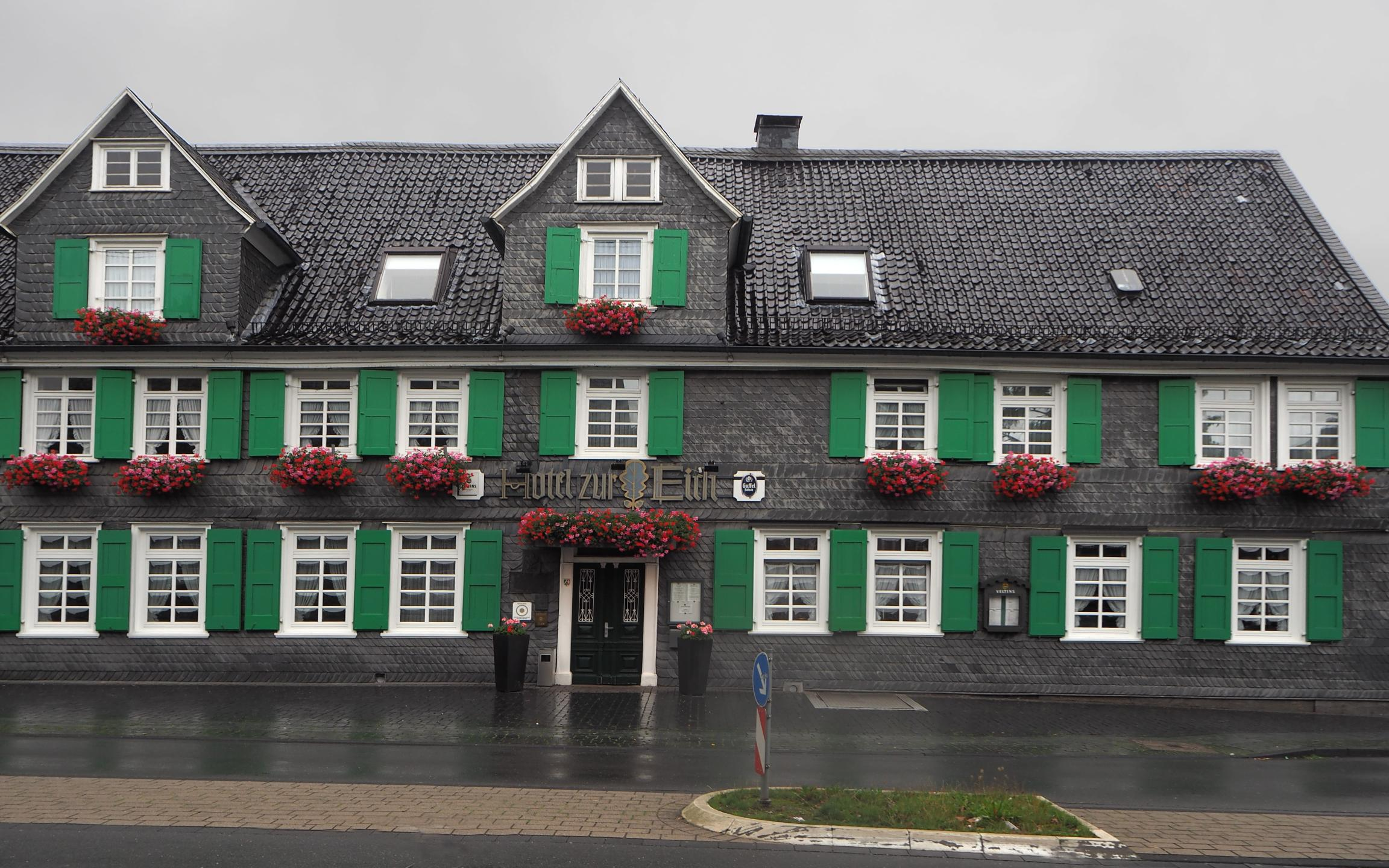 Wermelskirchen (NRW), Hotel zur Eich, Eich 7 , Foto: Juli 2015This is a photograph of an architectural monument.